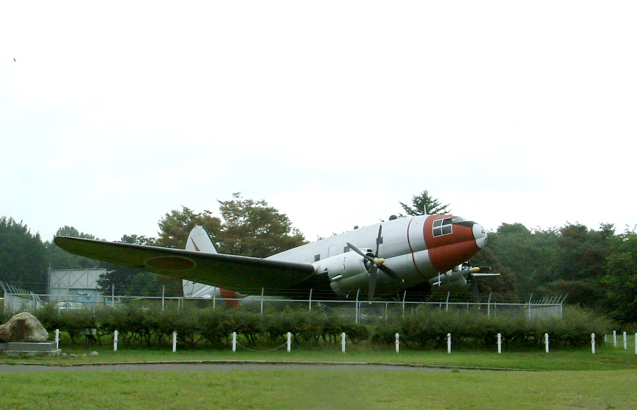 C-46A (所沢航空記念公園)